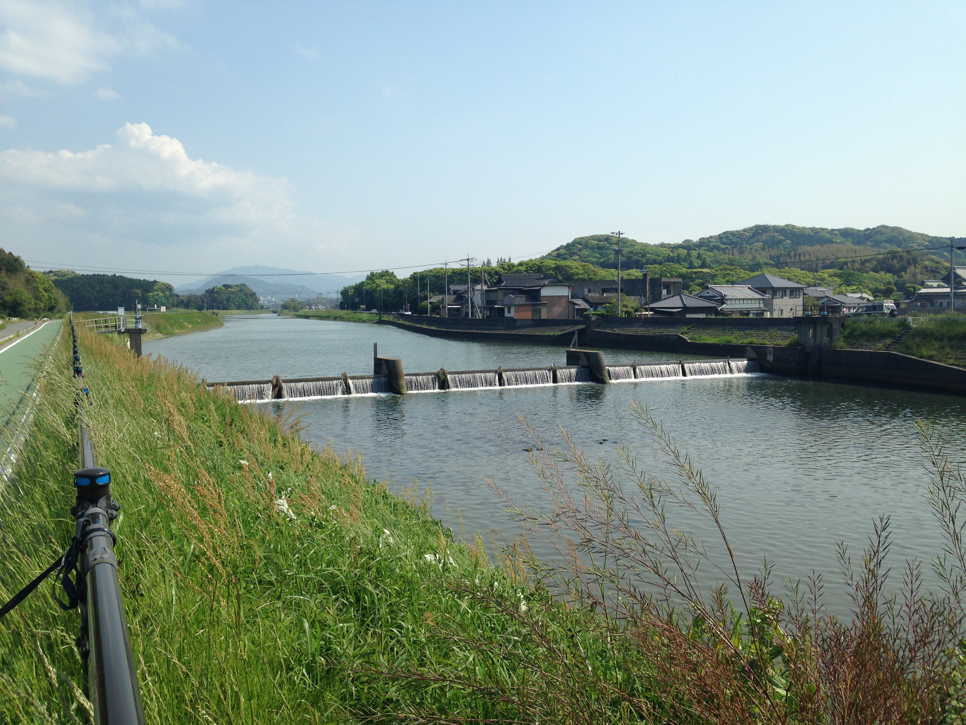 釣川にかかる川端井堰